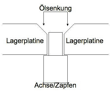 Ölsenkung, Zeichnung